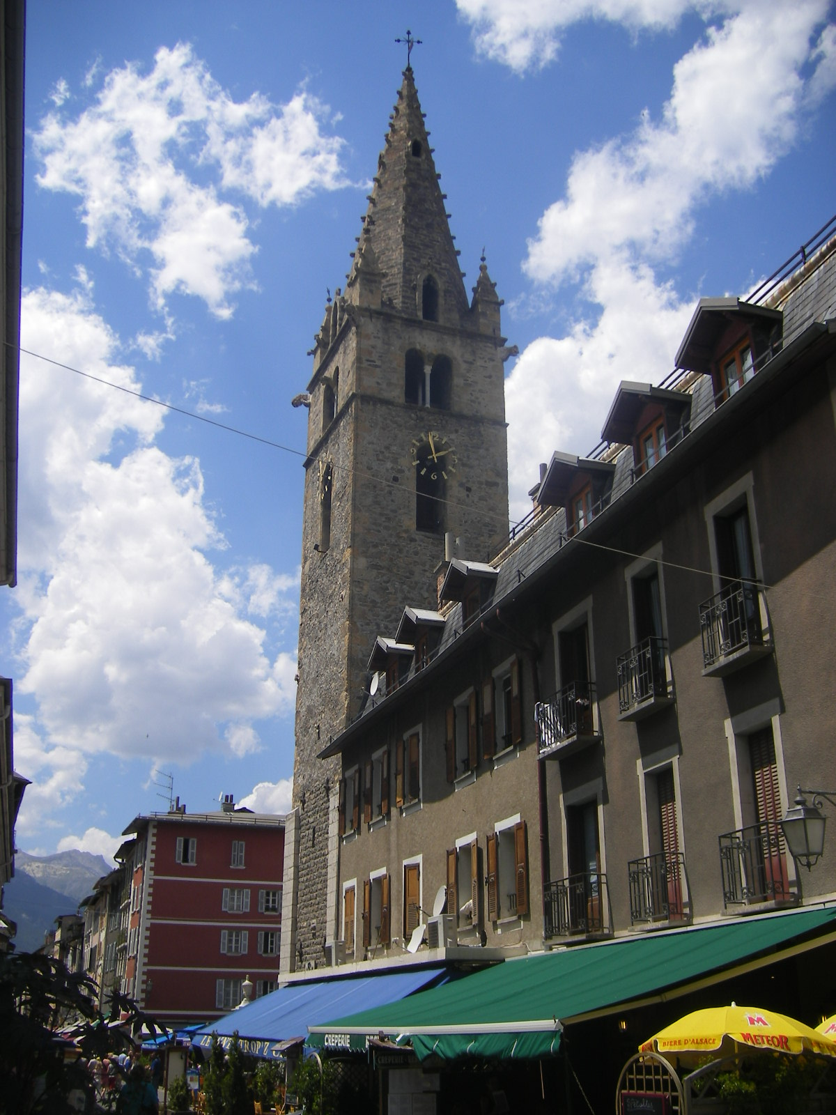 Barcelonnette